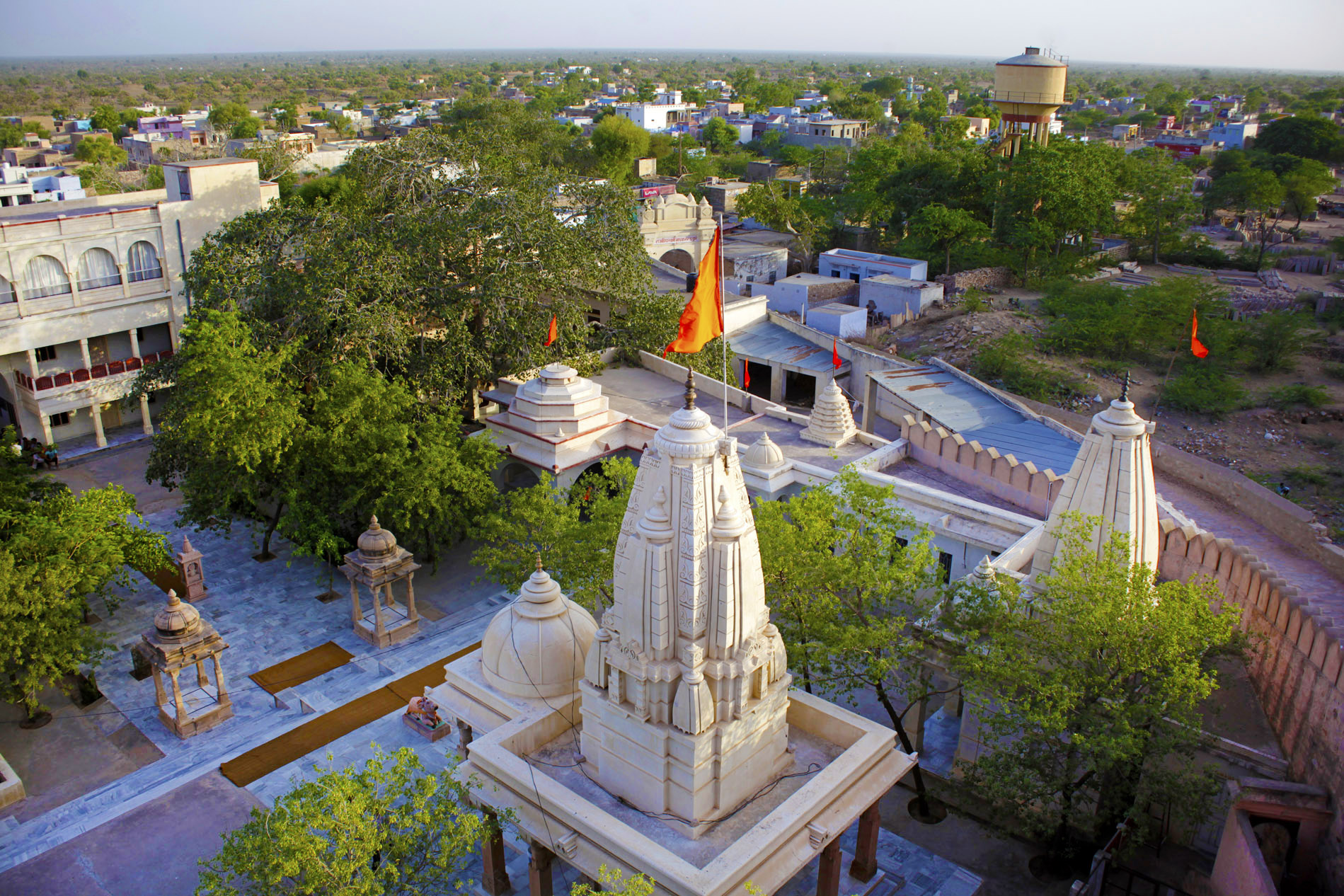 श्री दीपेश्वर महादेव शिव बाग़